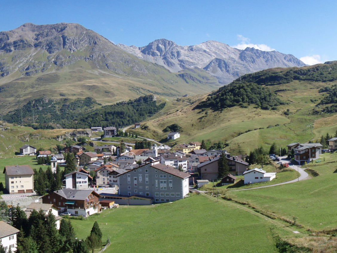 BivioRumantsch: Beiva